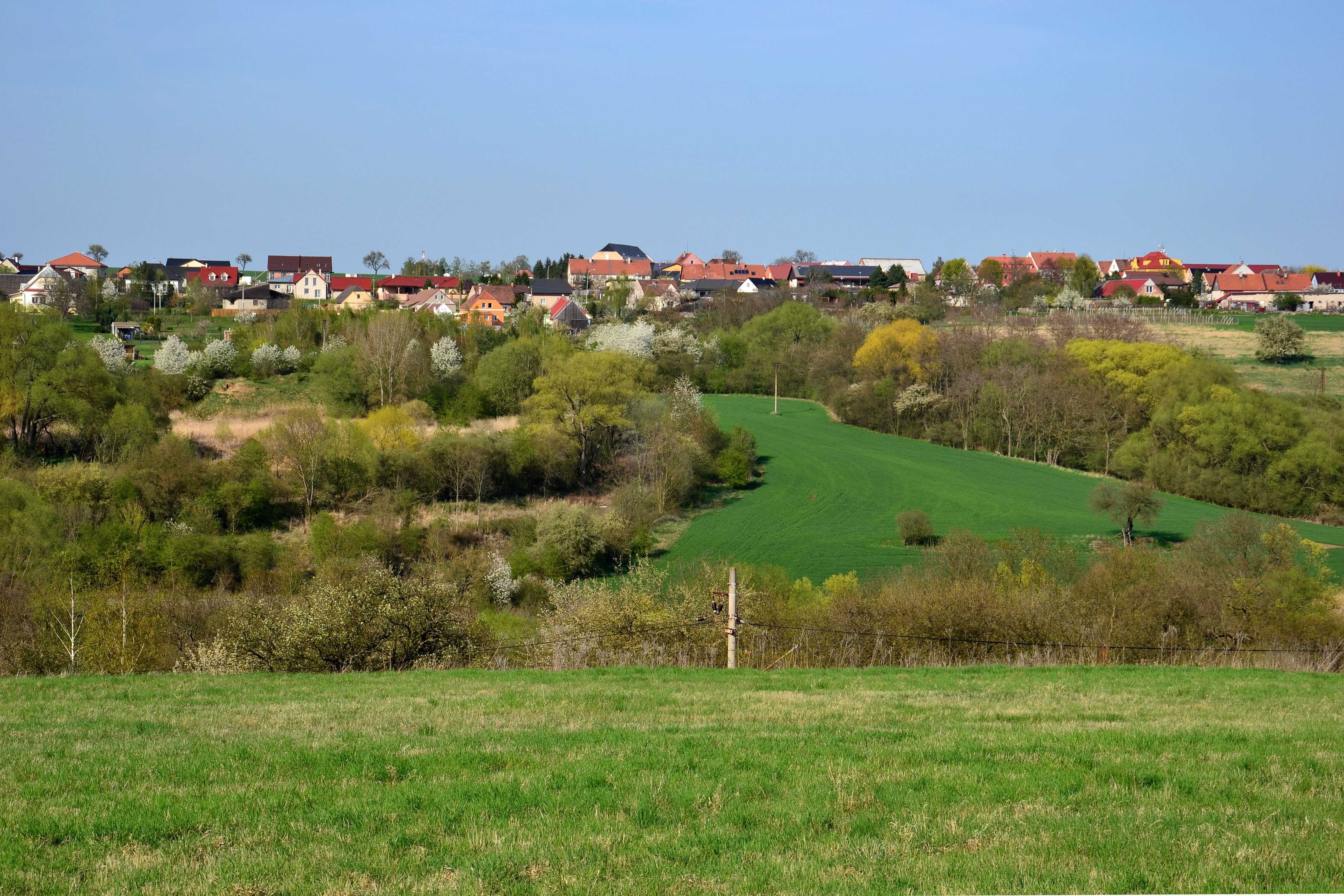 Hrušovany – pohled ze silnice z Hořetic do Denětic